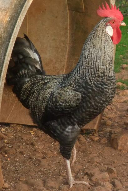 Pollastre mallorquí favat